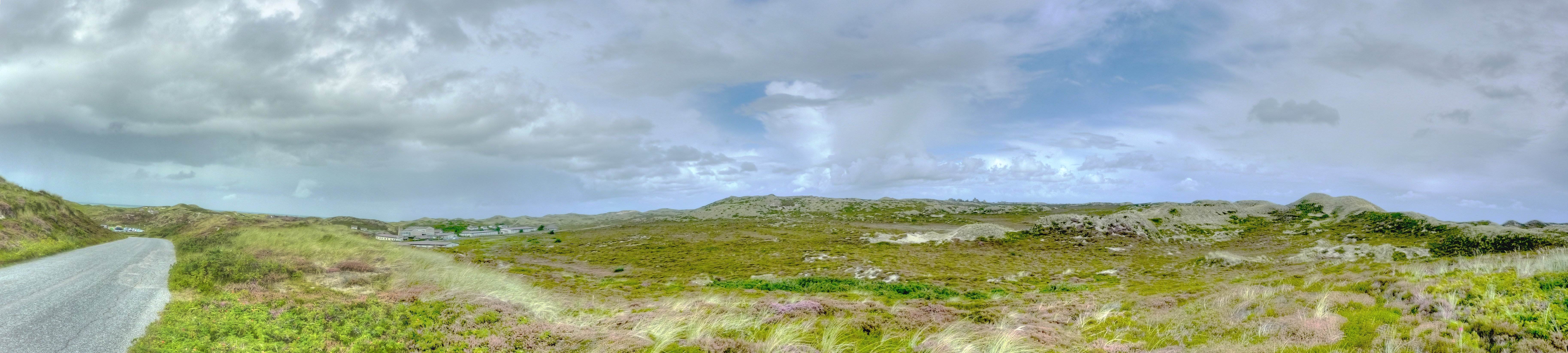 Klappholttal auf Sylt; Dünenlandschaft im Naturschutzgebiet „Nord-Sylt“